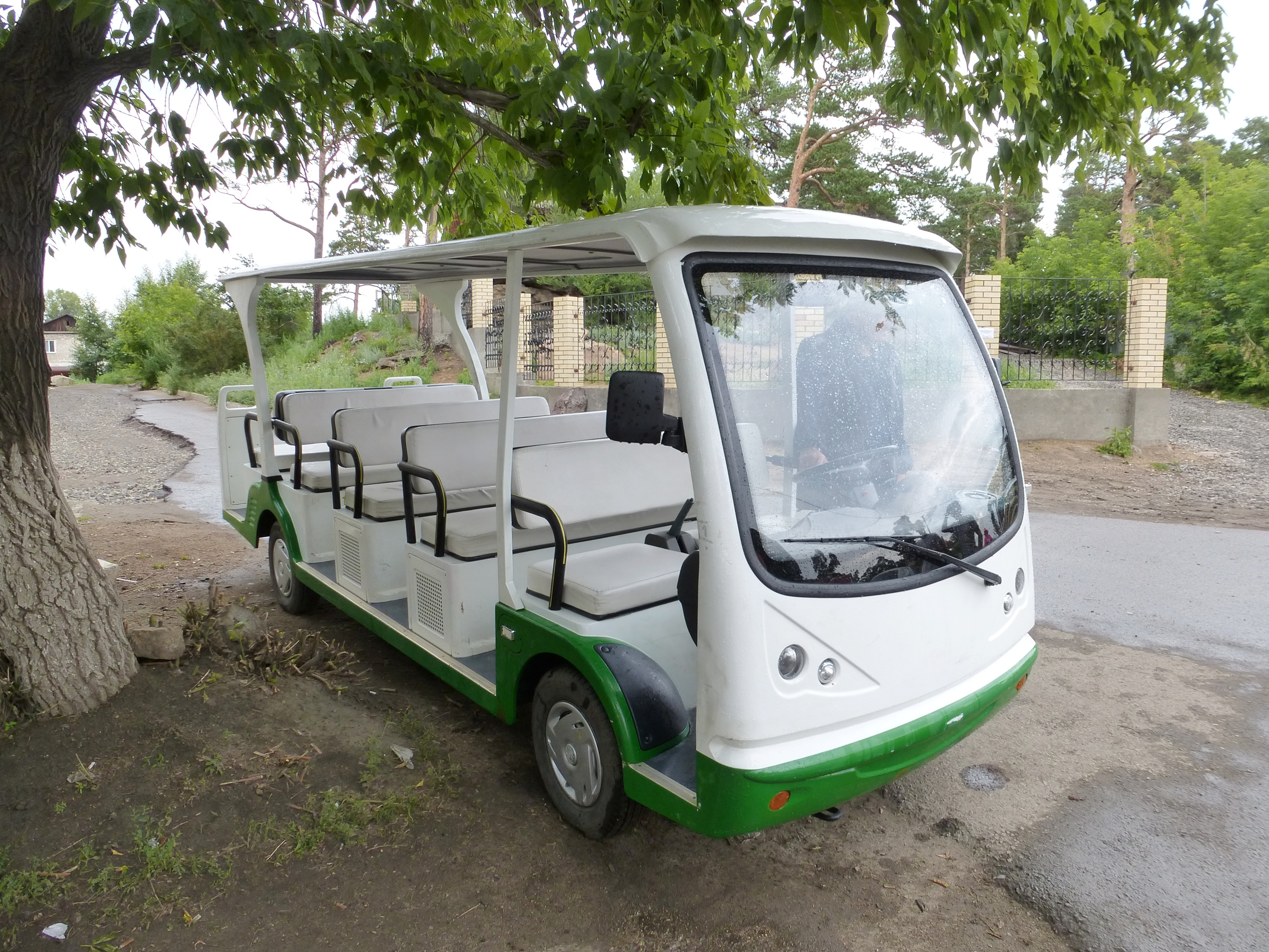 15-местный прогулочный электроавтобус китайского производства. Боровое. Казахстан